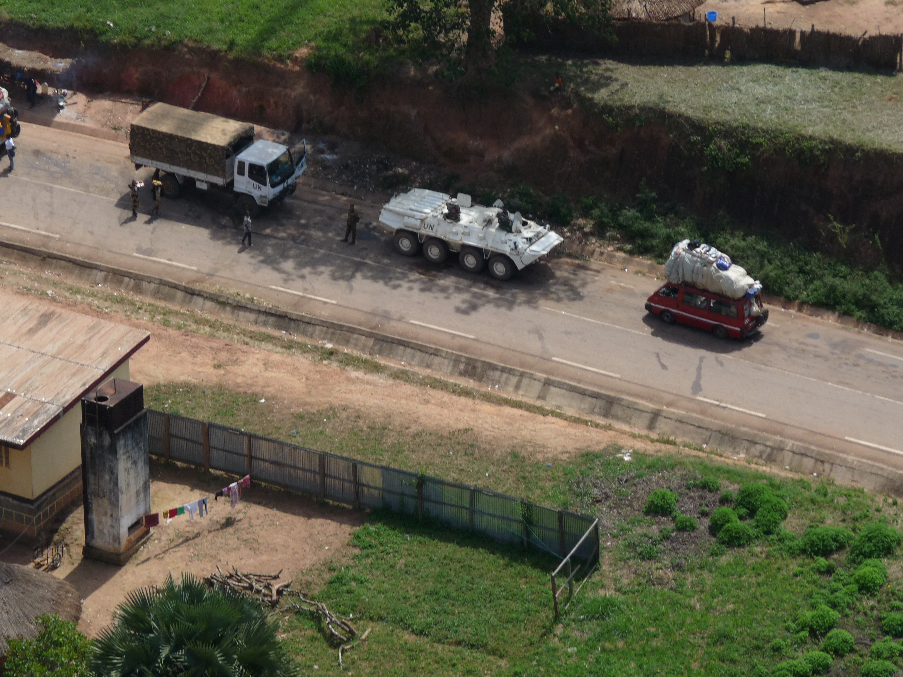 Un véhicule blindé des Nations Unies escorte le convoi commercial Bangui-Douala.